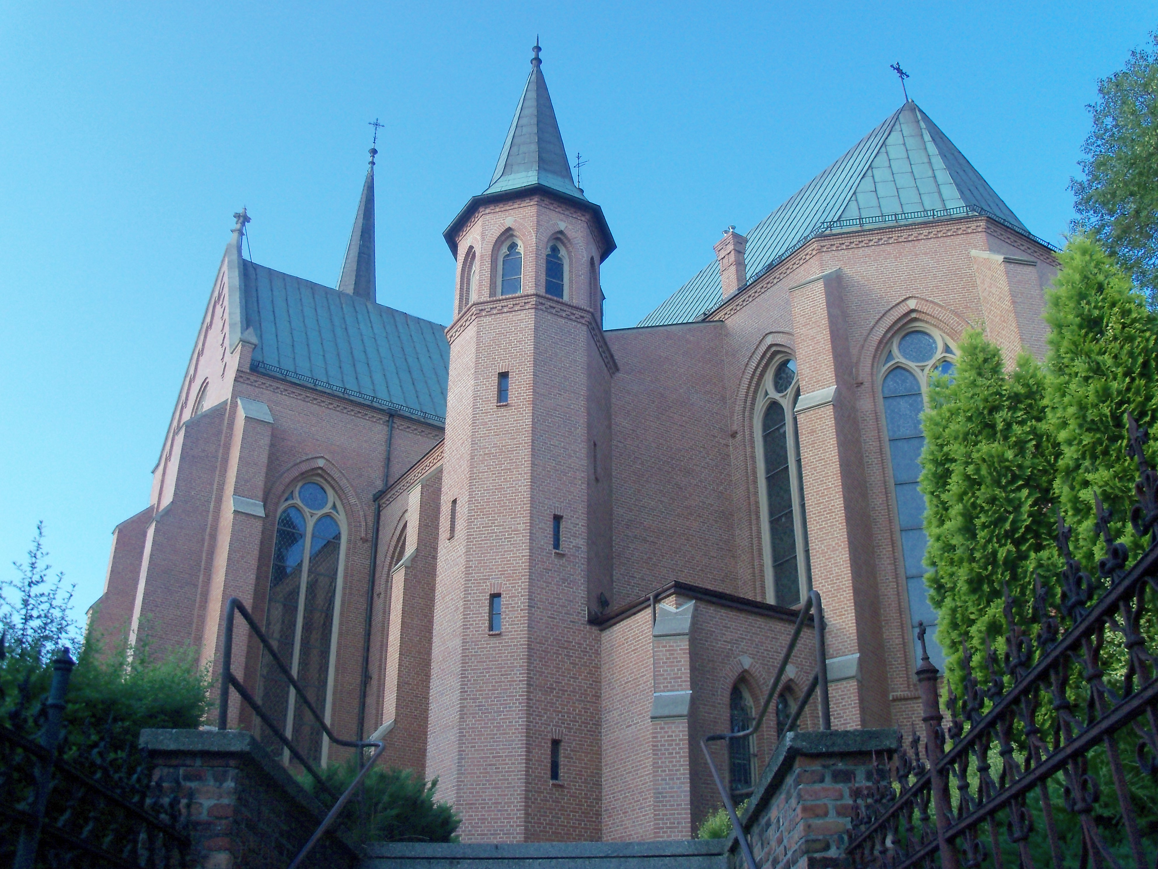 Kościół św. Szczepana w Katowicach-Bogucicach